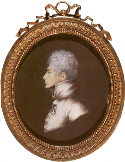 Остерман-Толстой Александр Иванович (граф) 1802-1806,Эрмитаж